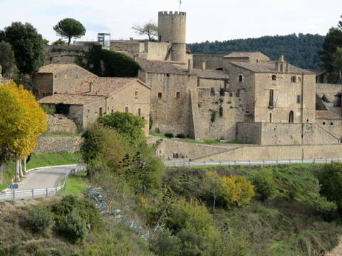 castell de Talamanca - Catalunya